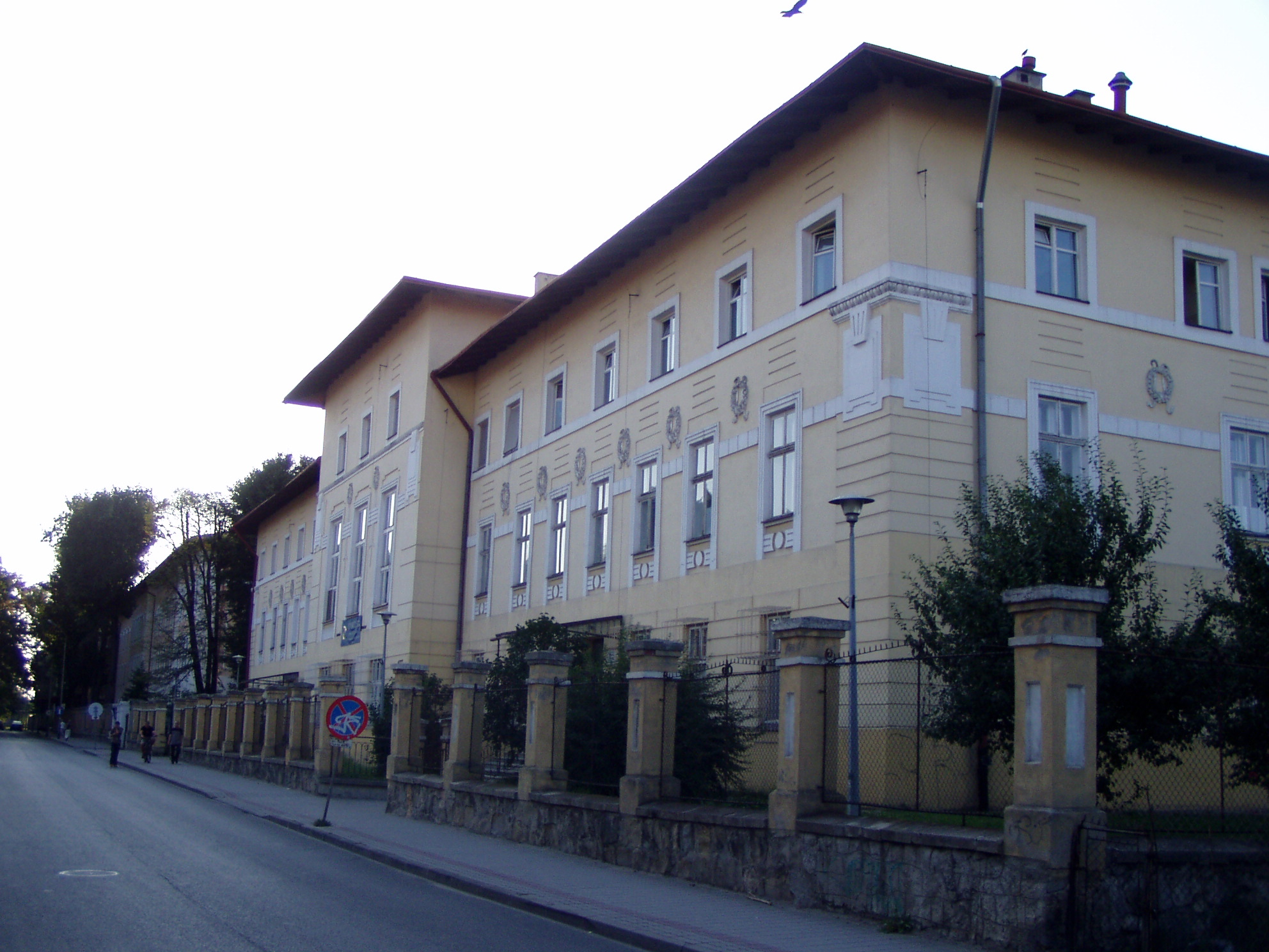 Jarosław_Kompleks_koszarowy_39 pułku piechoty Strzelców Lwowskich - obecnie SPZOZ Jarosław